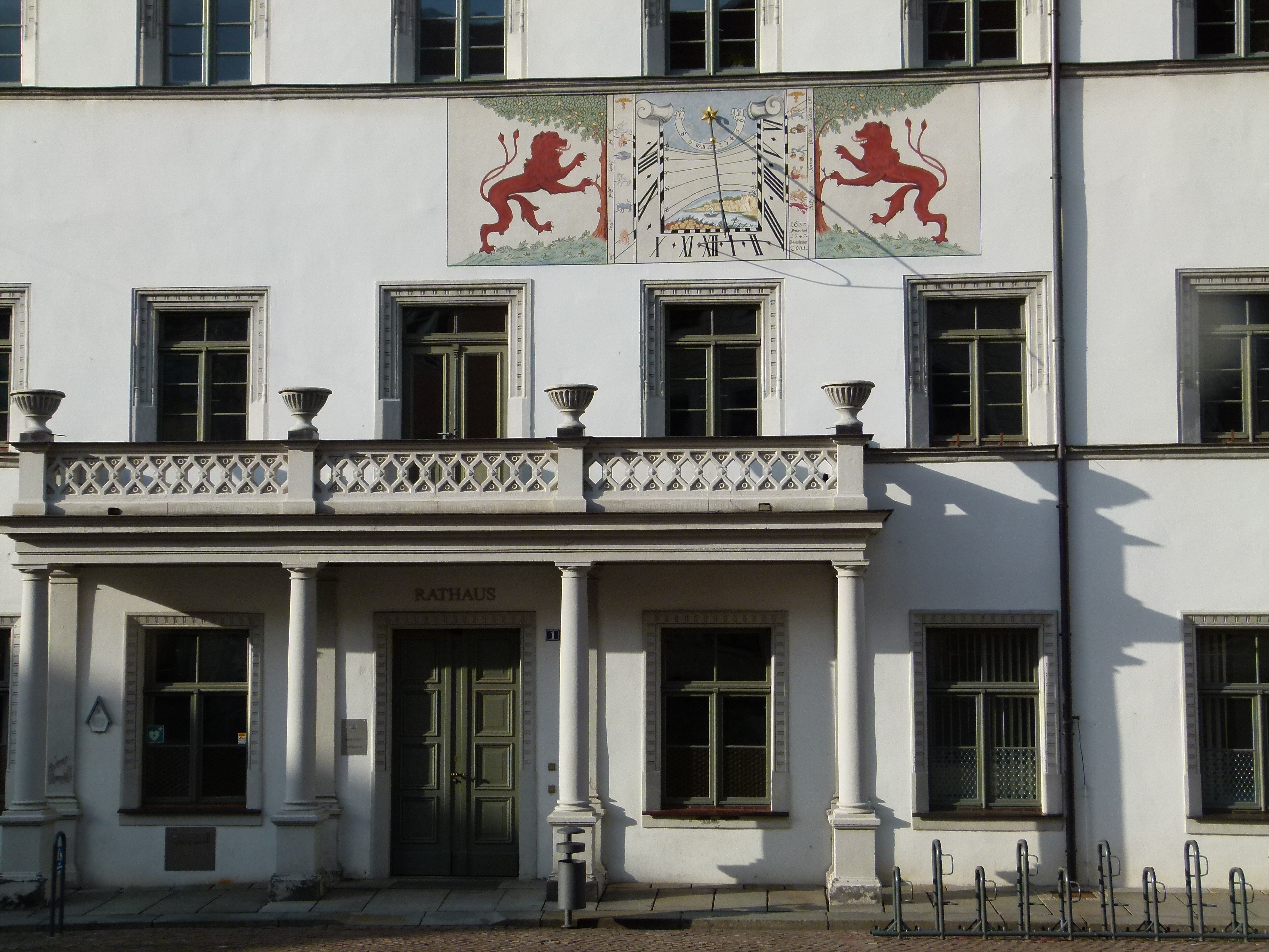 Eingang und Sonnenuhr vom denkmalgeschützten Rathaus von Pirna, Sachsen